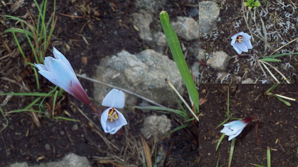 Habranthus coeruleus. Amaryllidaceae. Fotos tomadas en suelo rocoso al margen del lago de Palmar, departamento de Soriano, Uruguay.